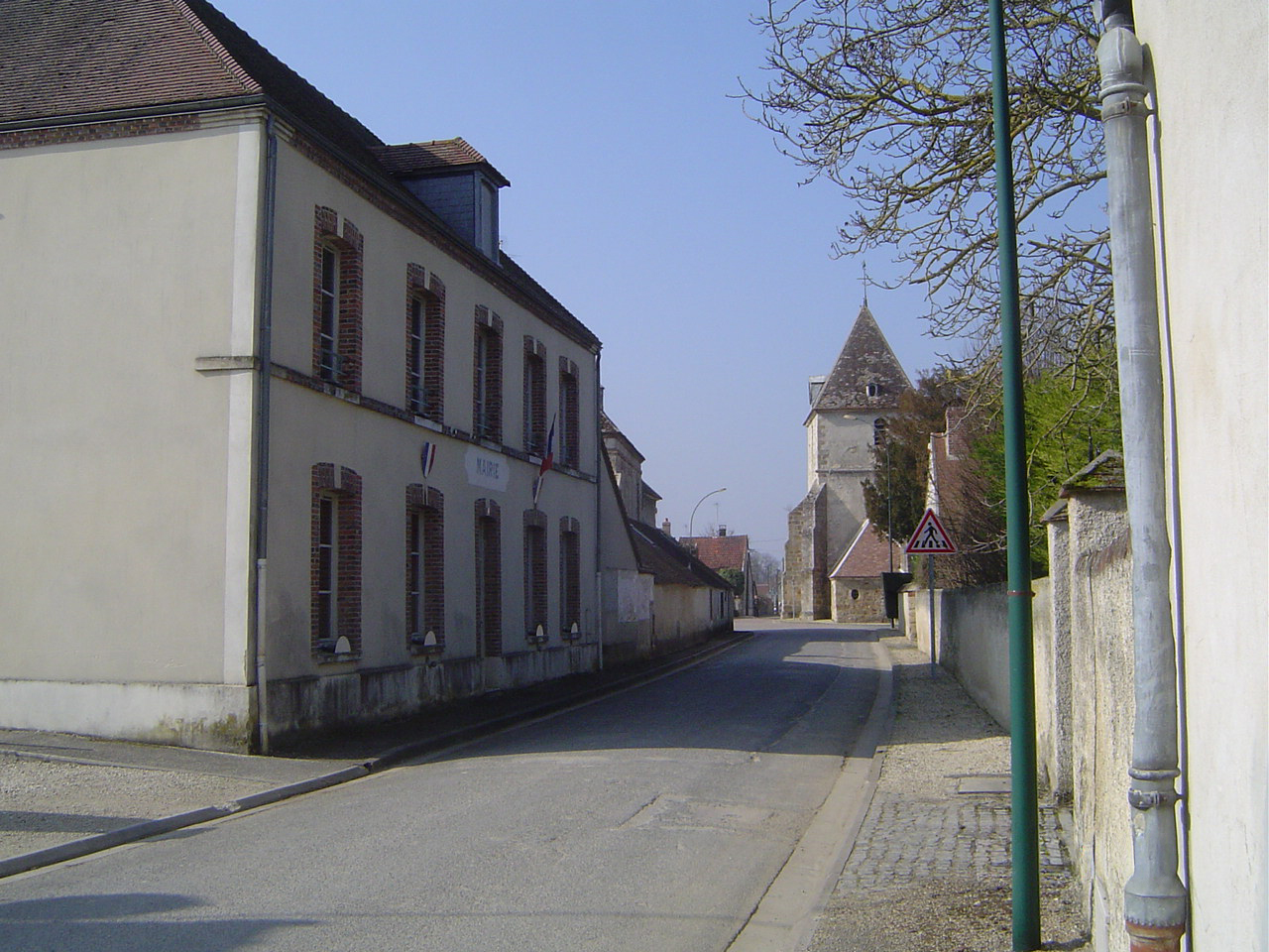 La Motte-Tilly - La mairie